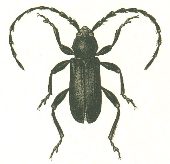 Ropalopus clavipes